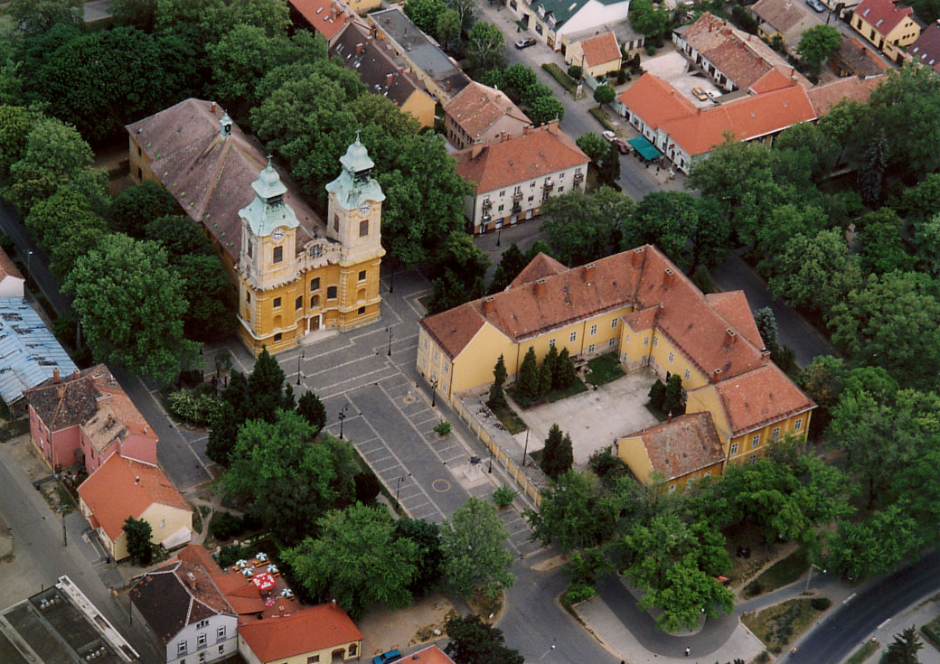 Celldömölk - Hungary - Europe